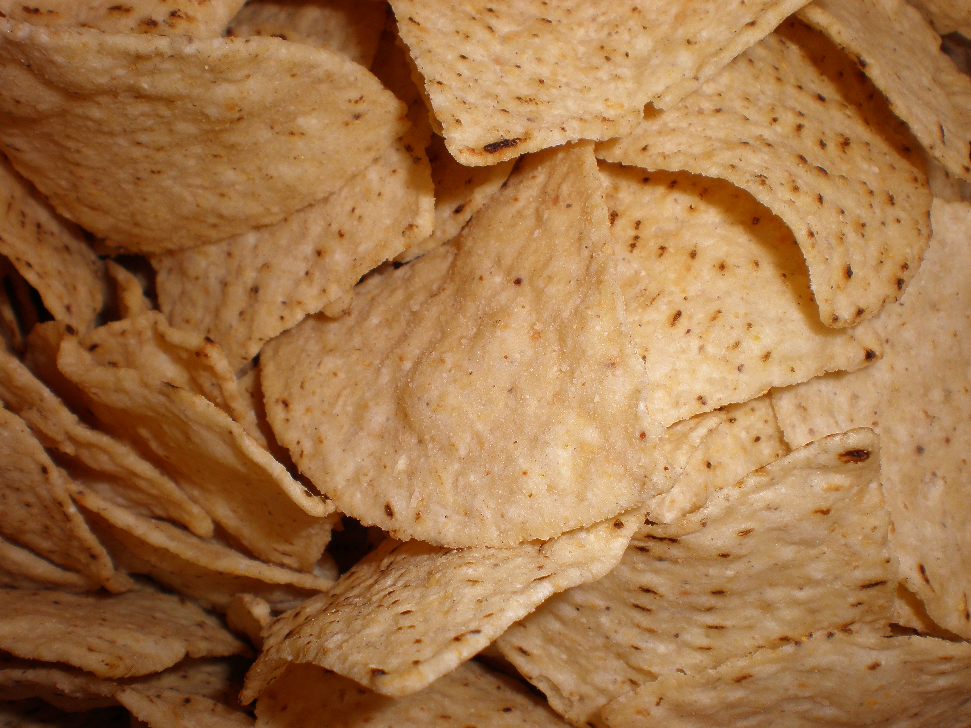 Mission Tortilla Triangles